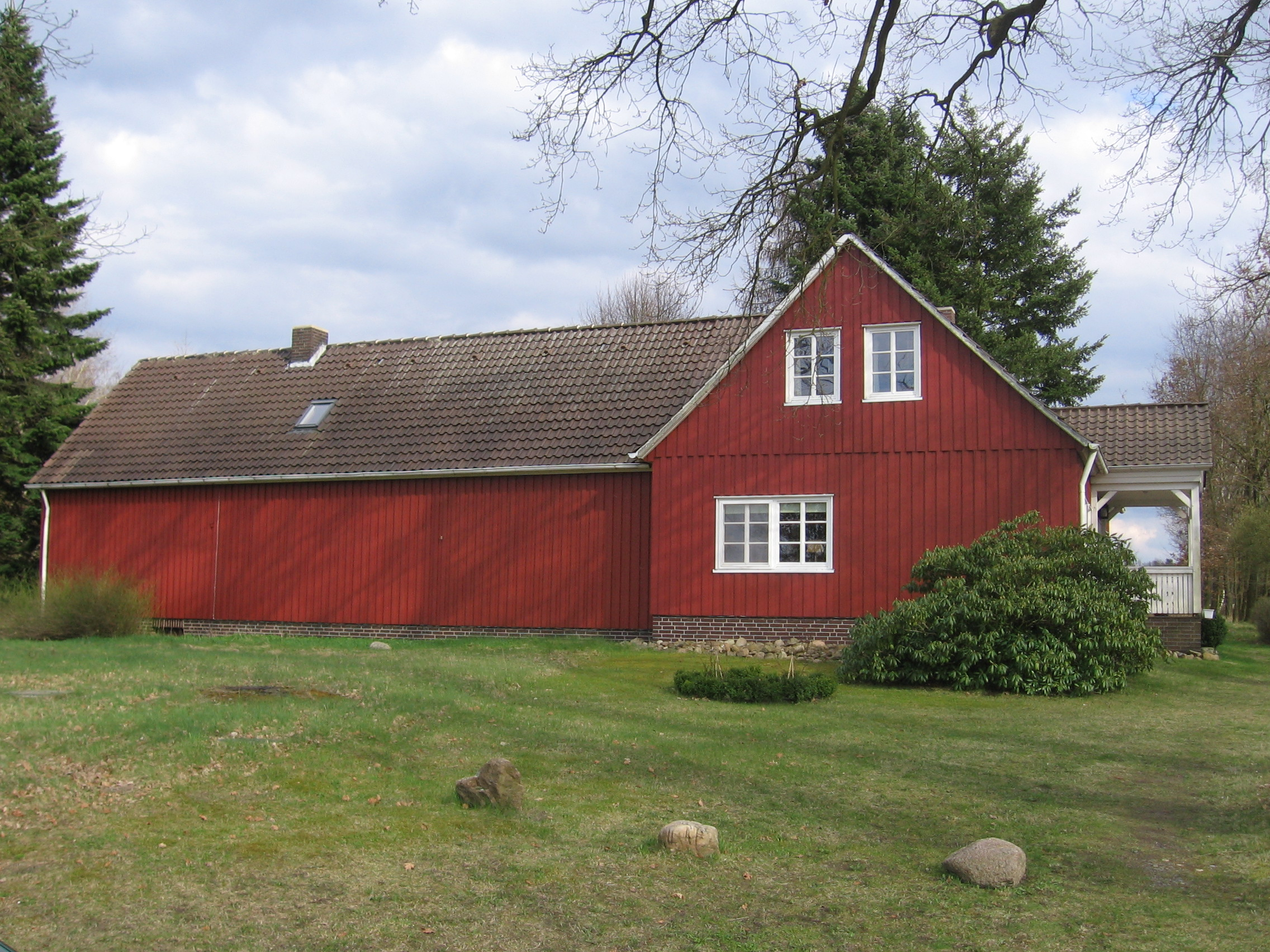 Das Antiquariat Das Bücherhaus, Inh. Hermann Wiedenroth in Bargfeld, Niedersachsen. Früher gehörte das Haus Wilhelm Michels, einem Mäzen des Schriftstellers Arno Schmidt.